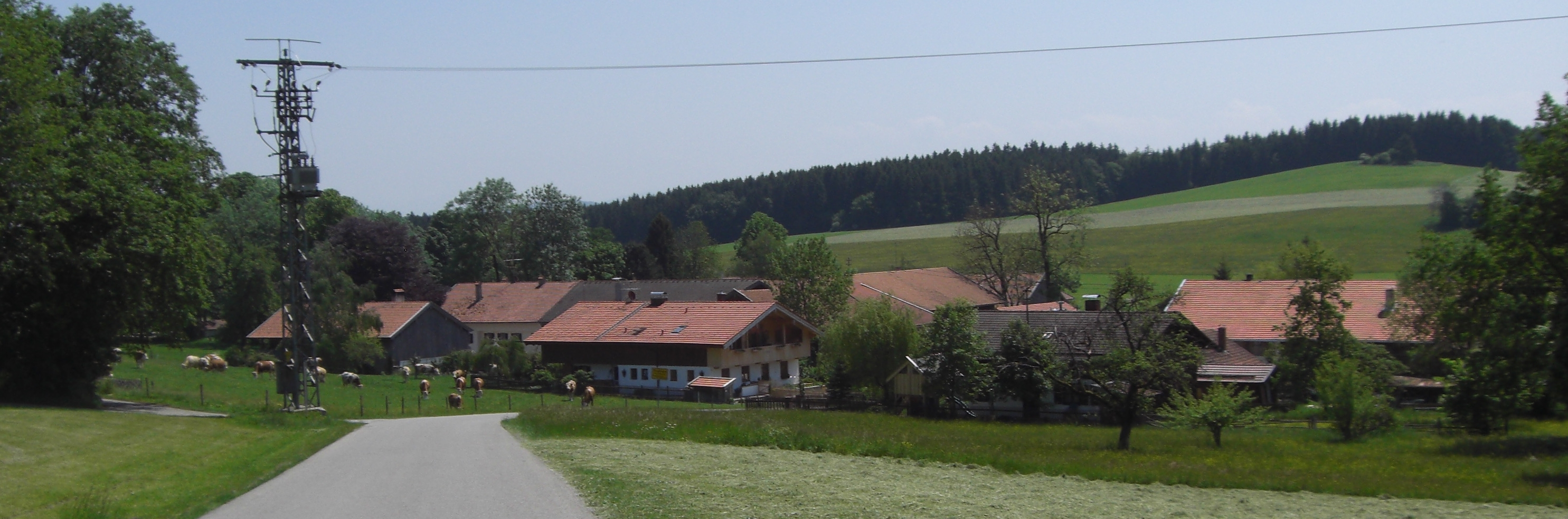 Panorama von Thalham, Dietramszell, Oberbayern